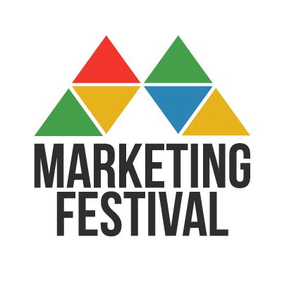 Logo Marketing Festivalu